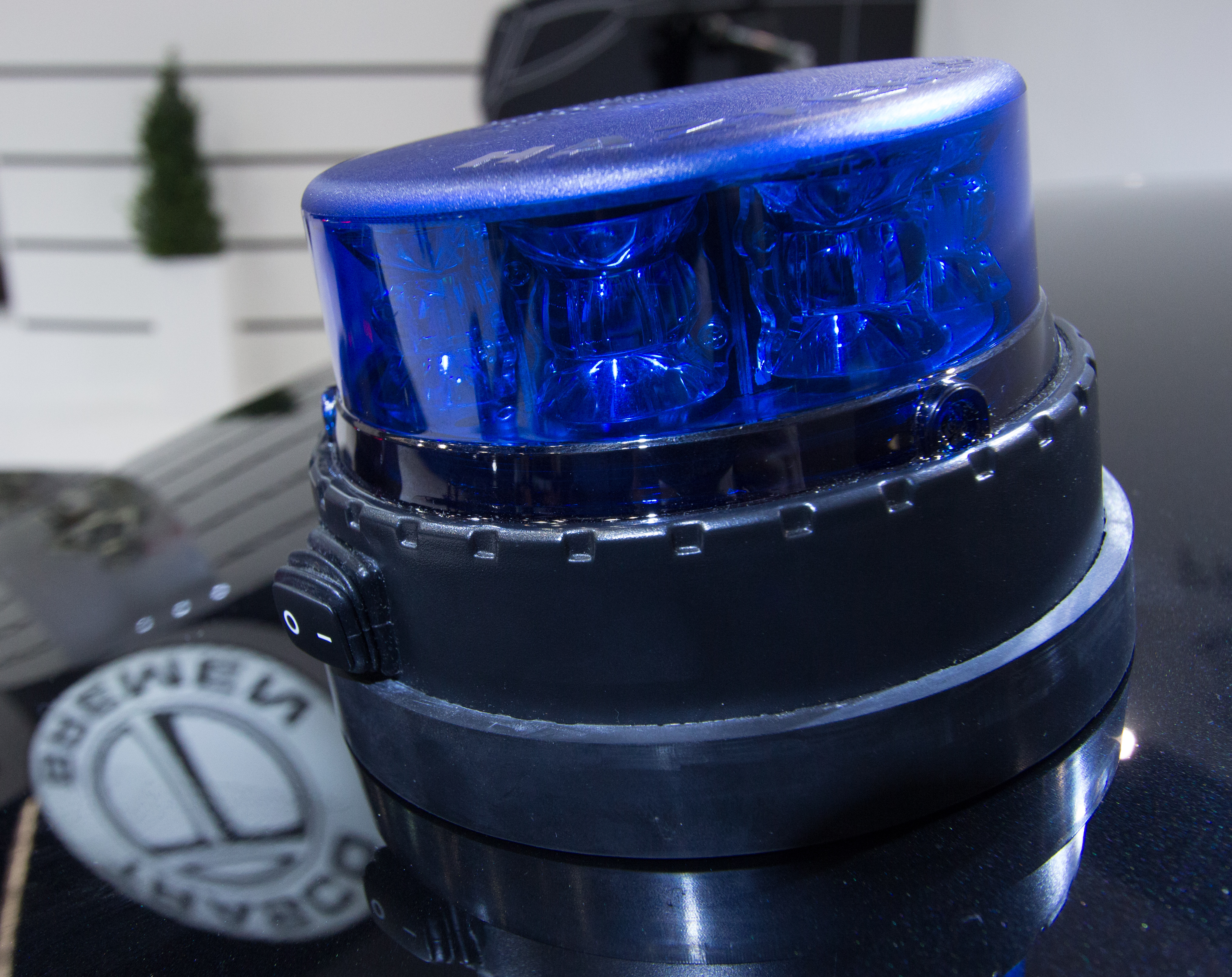 TRASCO auf der IAA 2017 in Frankfurt